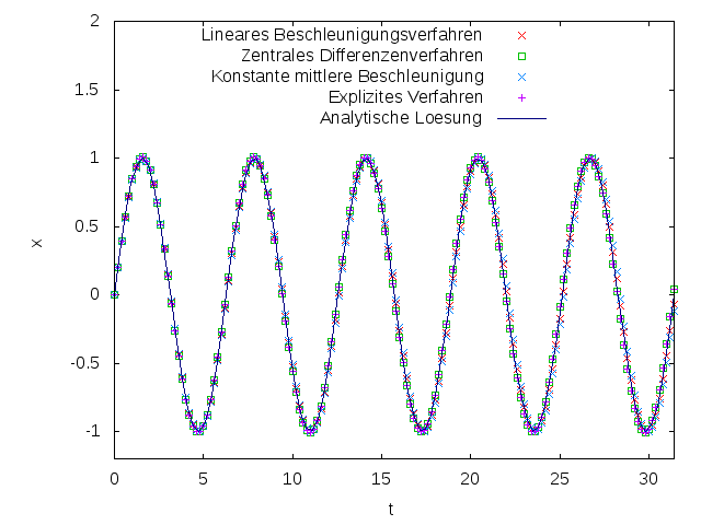 Zeitintegration mit Algorithmen der Newmark Familie